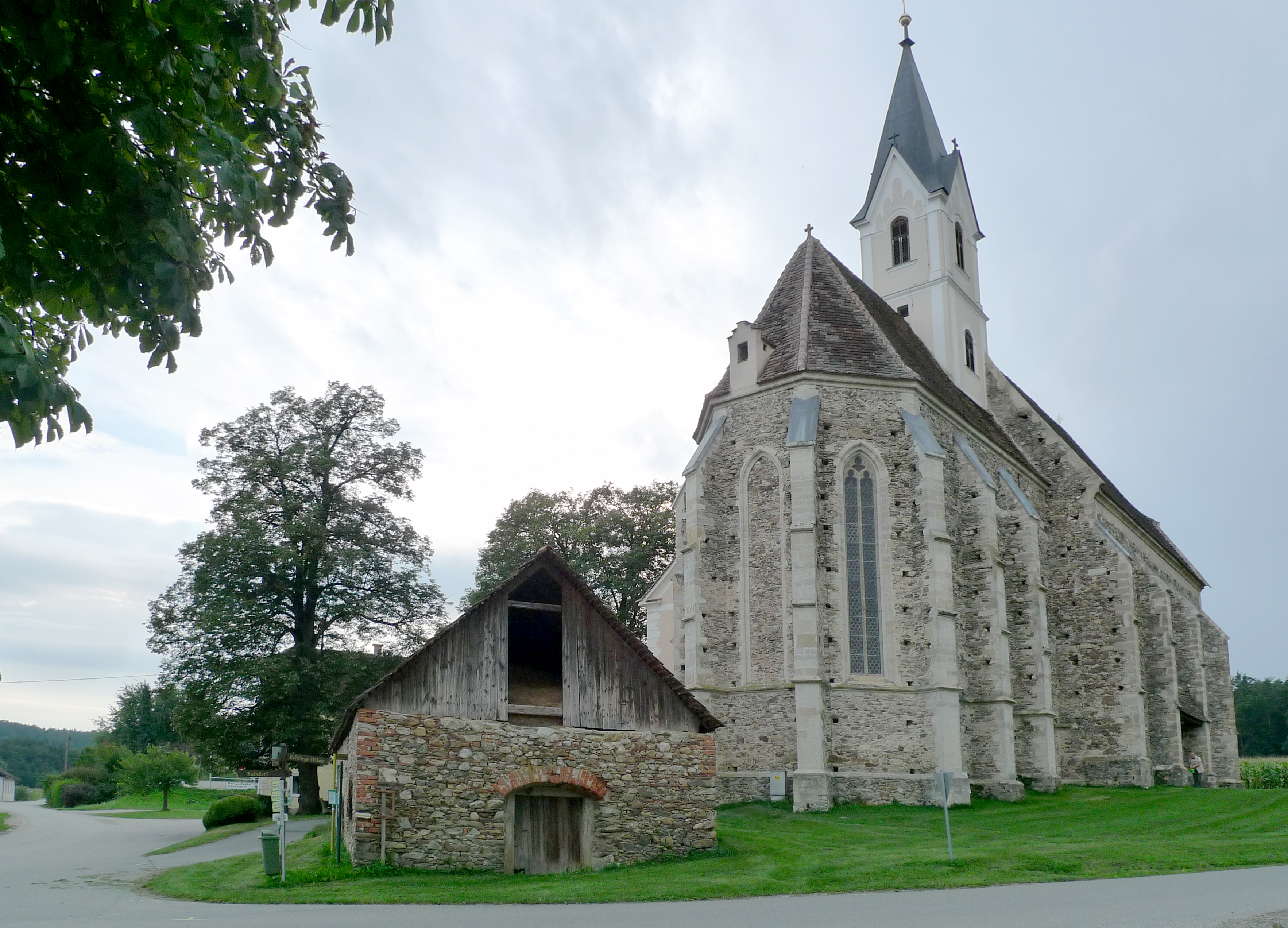 Kath. Filialkirche hl. Stephanus, Hofkirchen